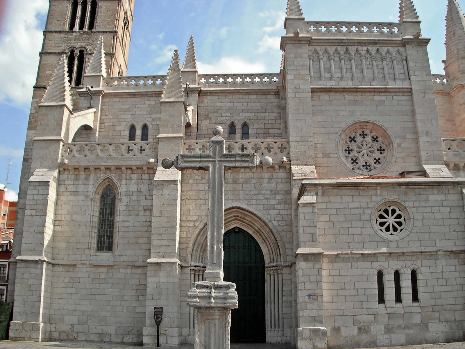 Portada de la Iglesia de Santa María de la Antigua en Valladolid